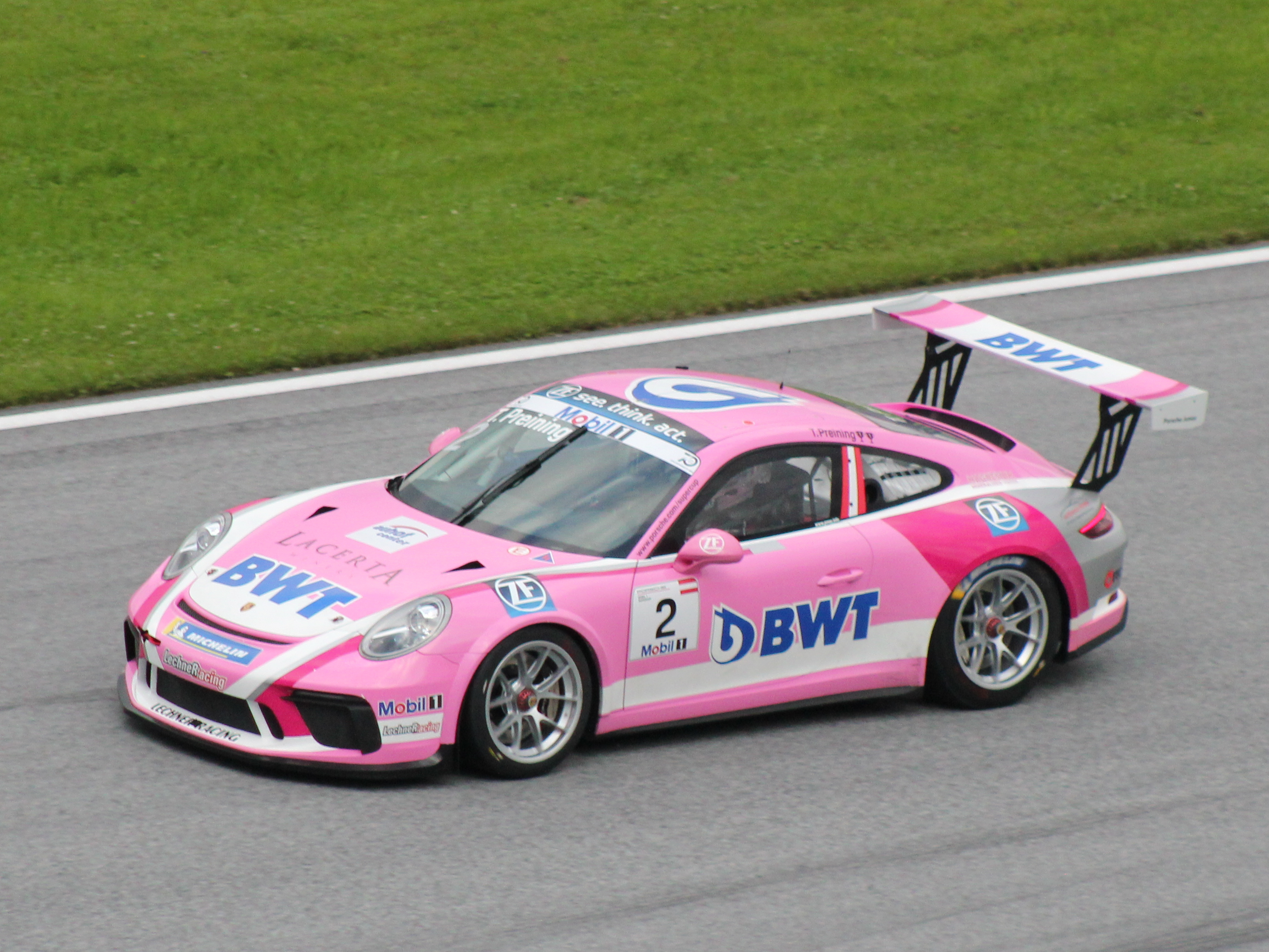 2 Thomas Preining beim Rennwochenende in Österreich 2018